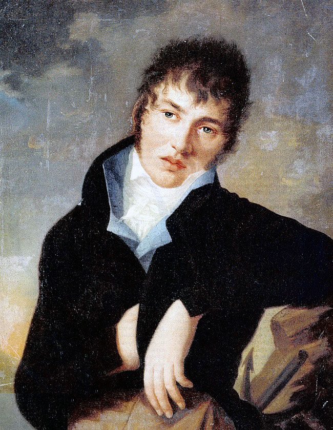 Федор Толстой-Американец в молодости. Картина неизвестного художника 19 века в музее Льва Толстого на Пречистинке, Москва. Fedor Ivanovitch Tolstoy by unknown painter